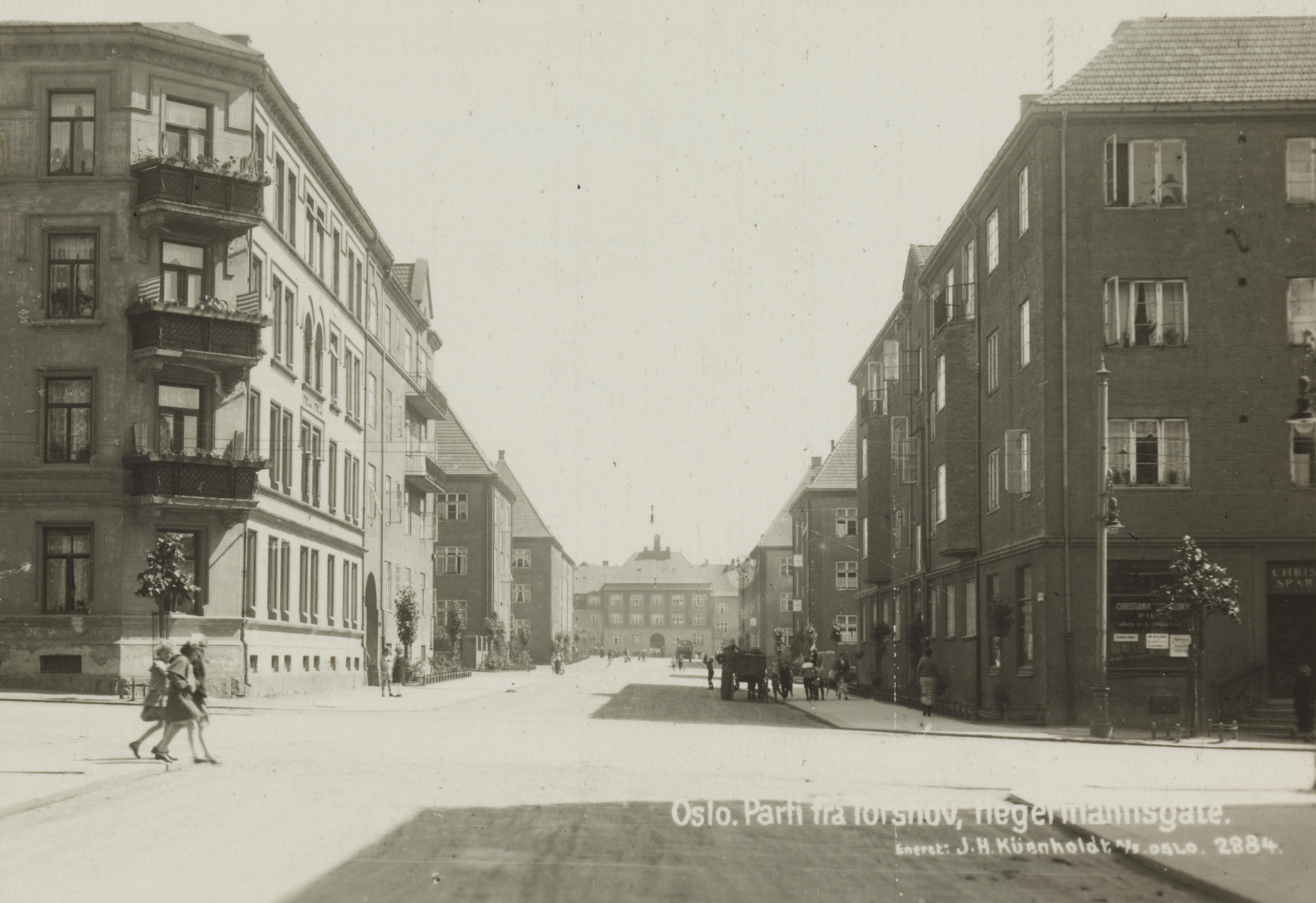 Bildet er hentet fra Nasjonalbibliotekets bildesamling Hegermanns gate,Torshov, Oslo, Oslo